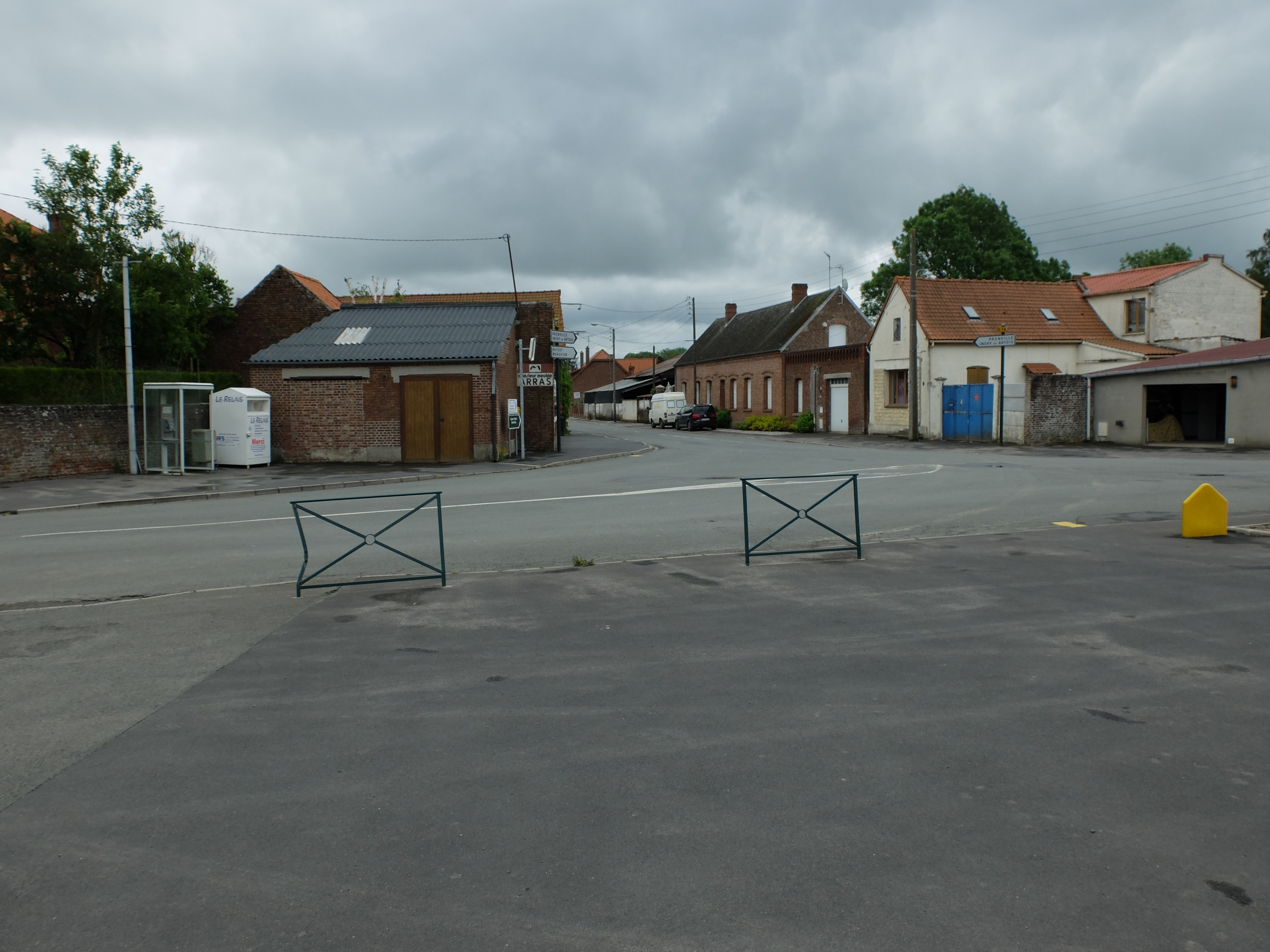 Vue de Quéant : intersection de la Grande Rue, la rue de Riencourt et la rue de l'église.